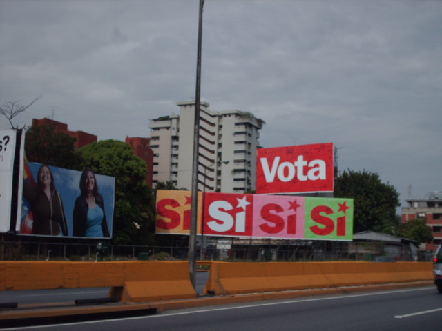 Propaganda por el Si, Referendo enmienda 2009. Caracas, Venezuela.